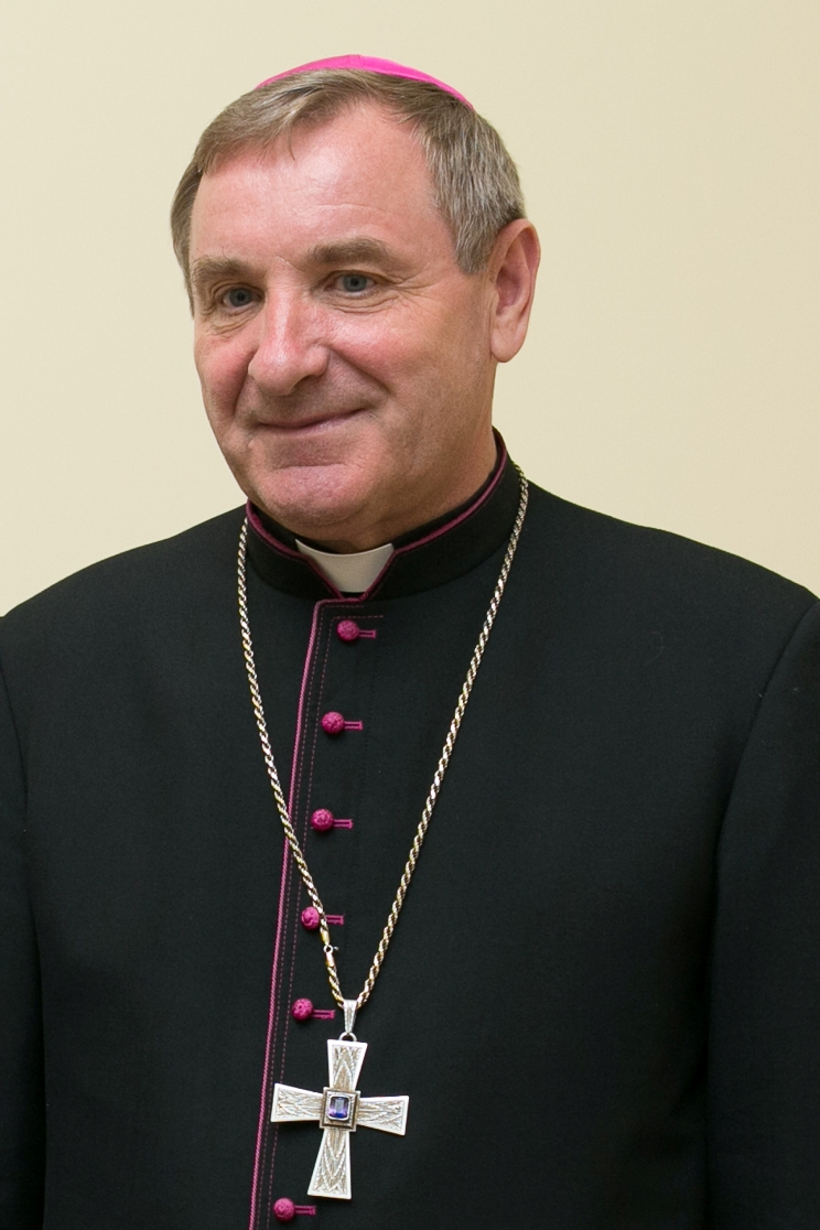 Bīskaps Jānis Bulis